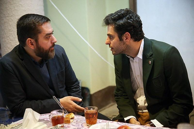 پشت صحنه مجموعه تلویزیونی دودکش دو